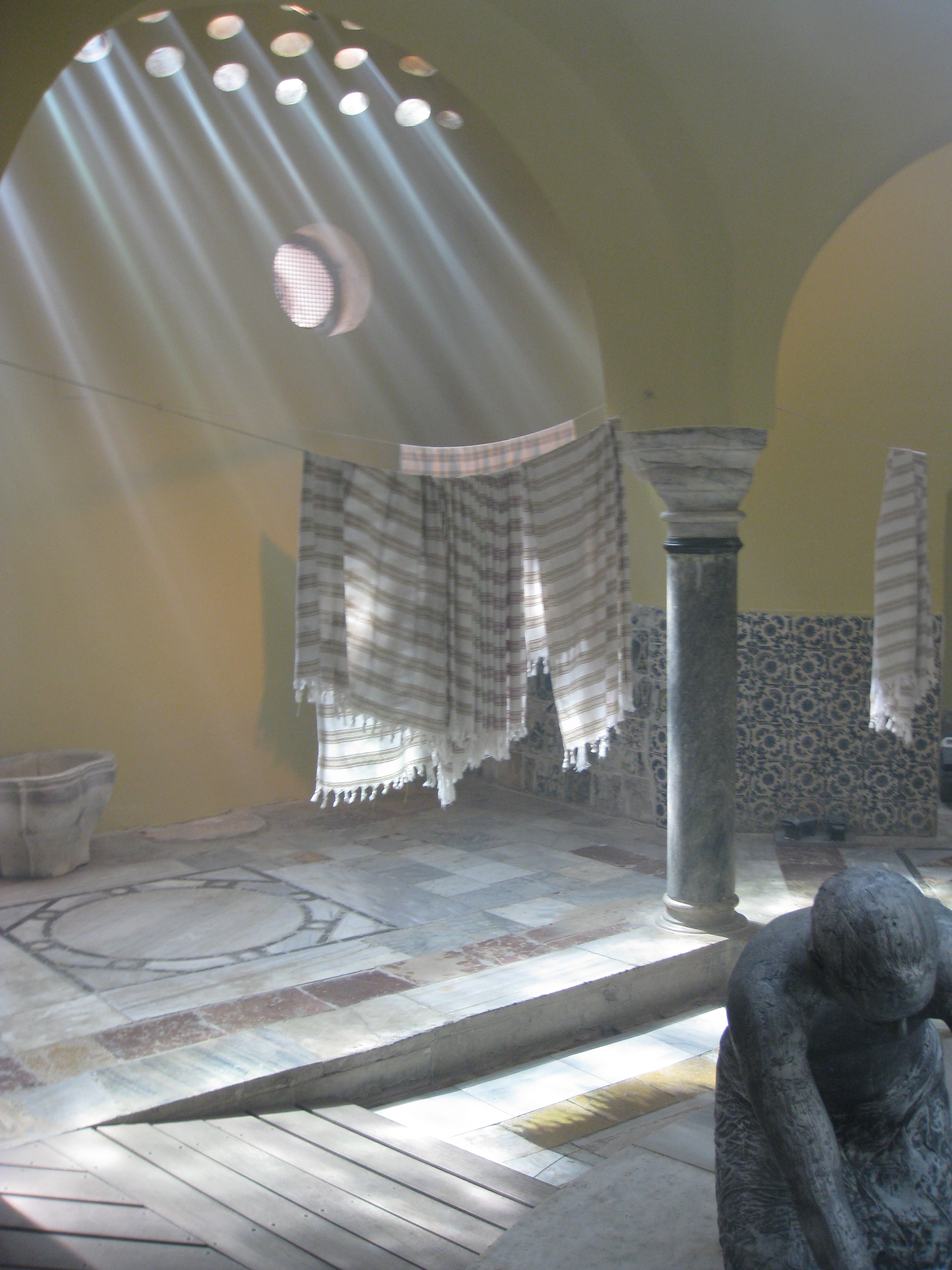 Acco (Acre, Akko) - Hamam el Basha (Hamam el Pasha) עכו חמאם אל באשה (חמאם אל פאשה) - בית המרחץ התורכי